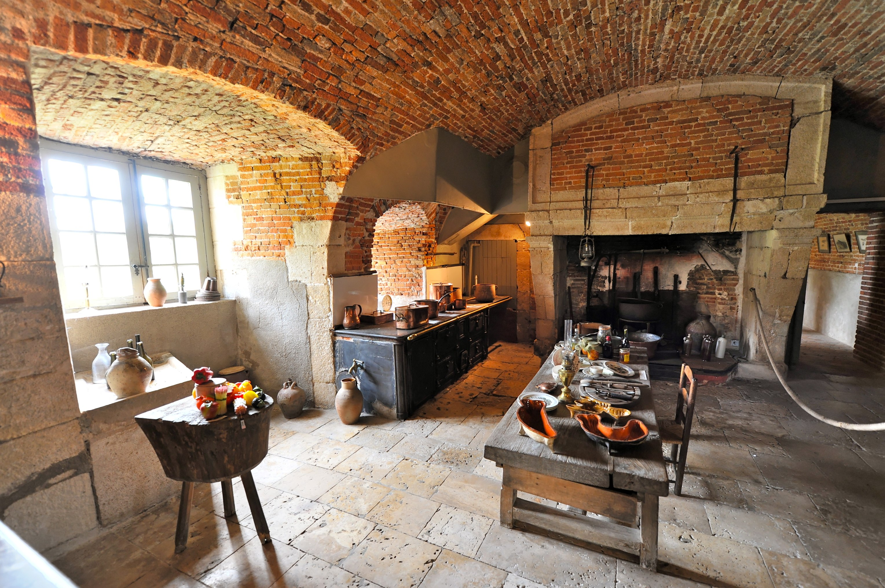 Küche im Schloss La Bussière